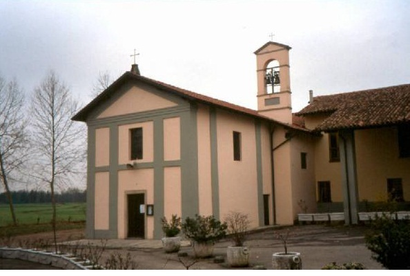 Santuario della Madonna dell'Acquanera a Boffalora sopra Ticino